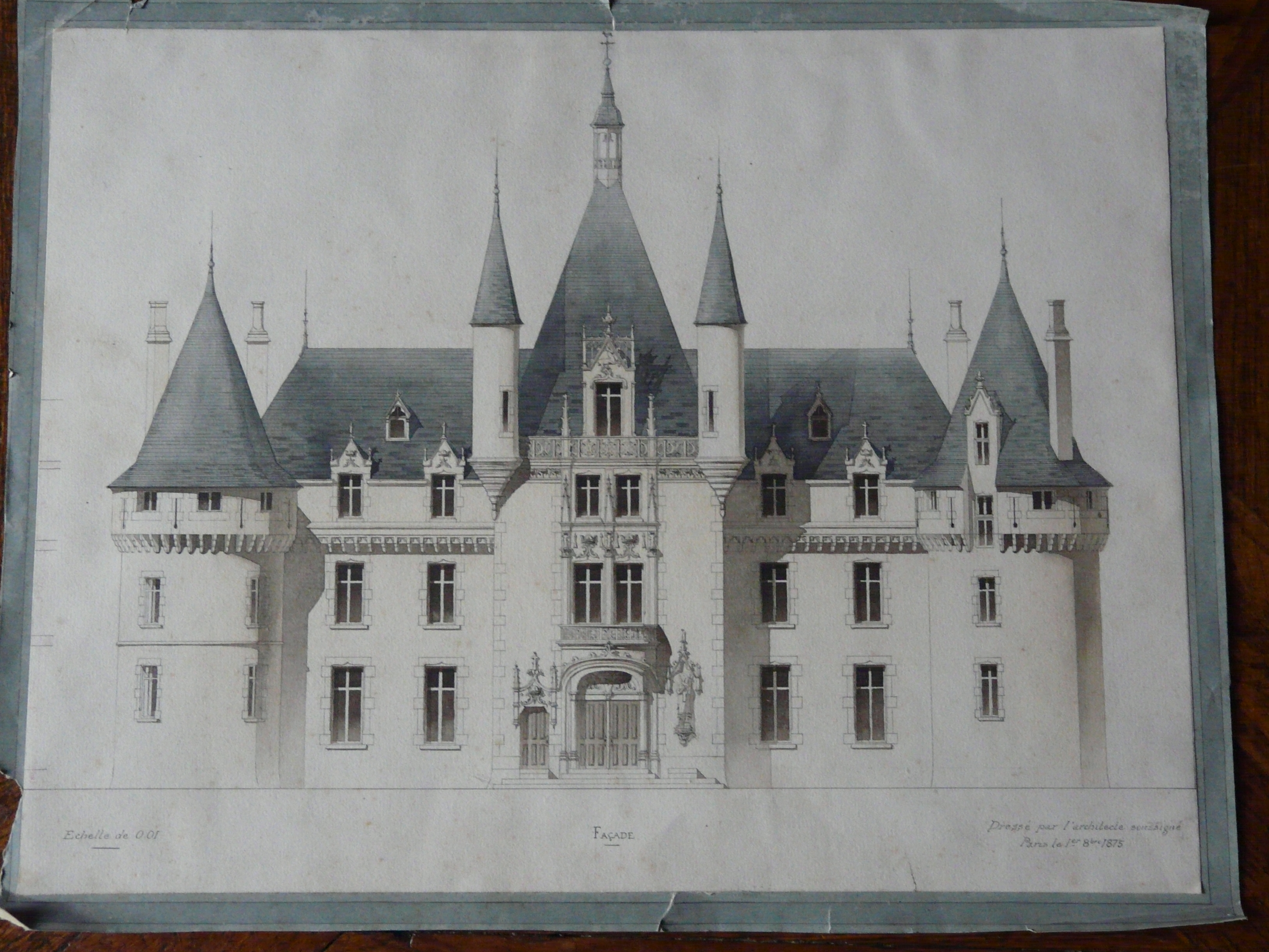 Projet par les architectes Châtelain et Lavenant